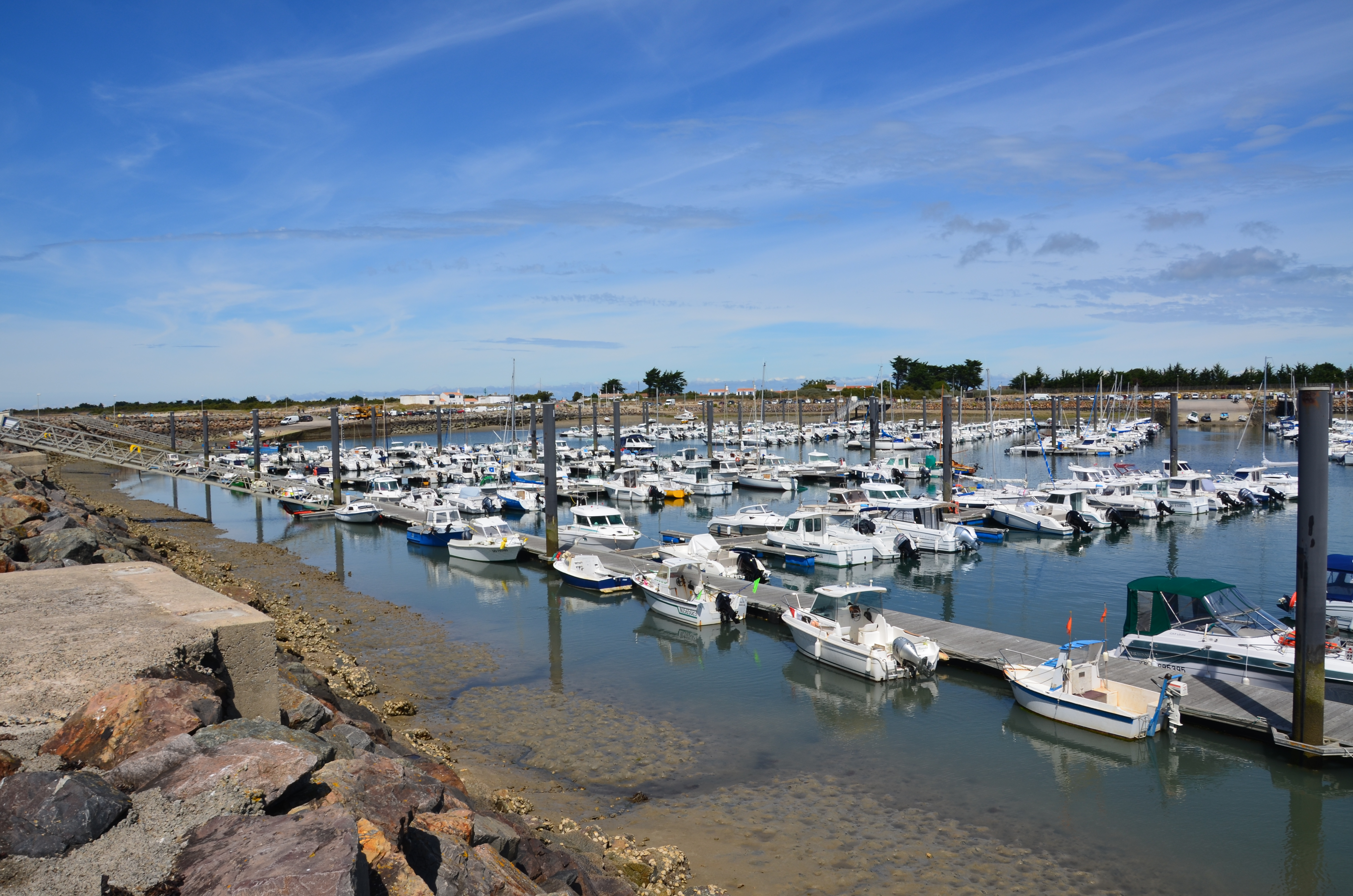 Vue du port de Morin à marée basse. Commune de L'Épine sur l'Île de Noirmoutier en Vendée.